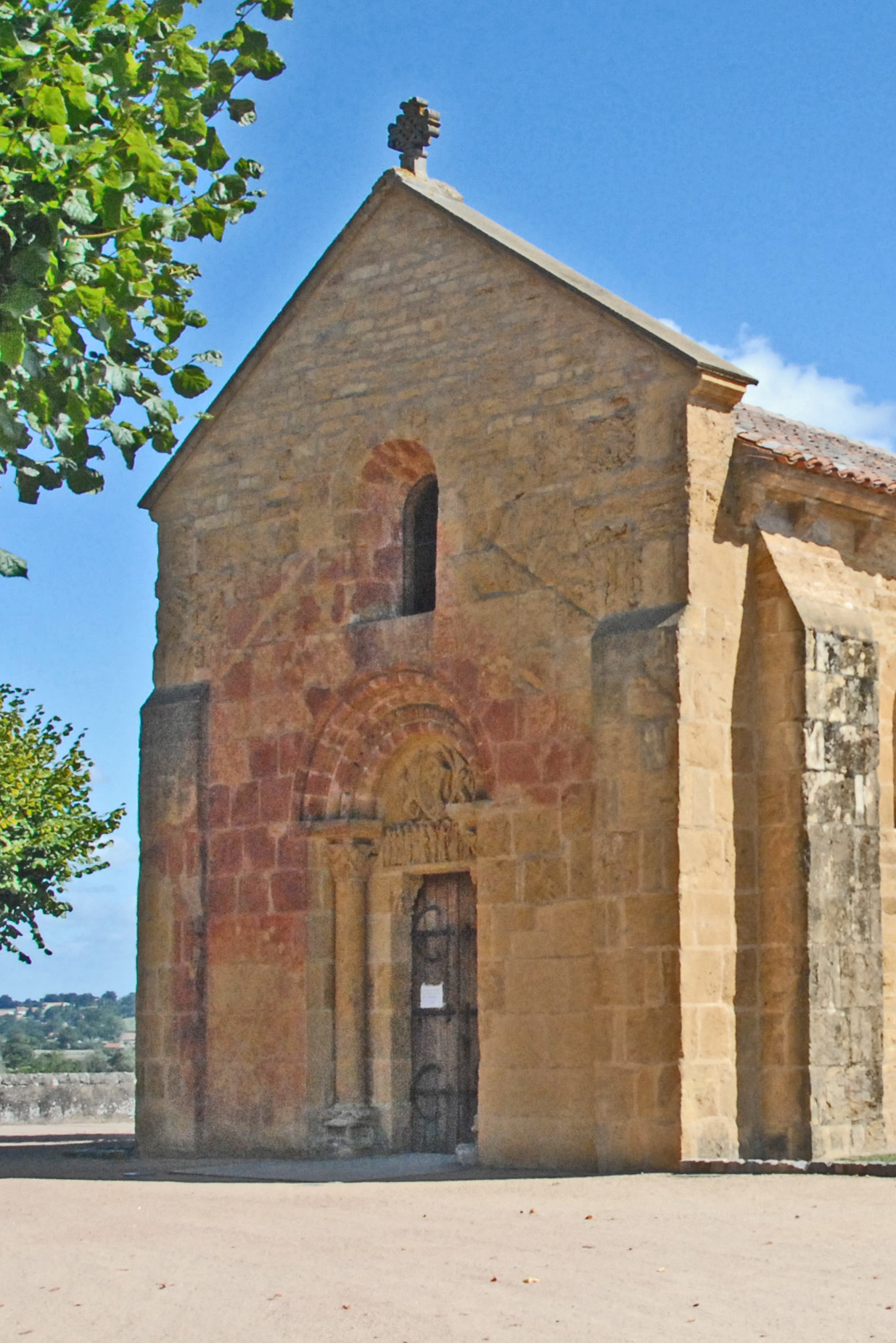 Sts-Pierre-et-Paul de Montceaux l'Étoile, von SW